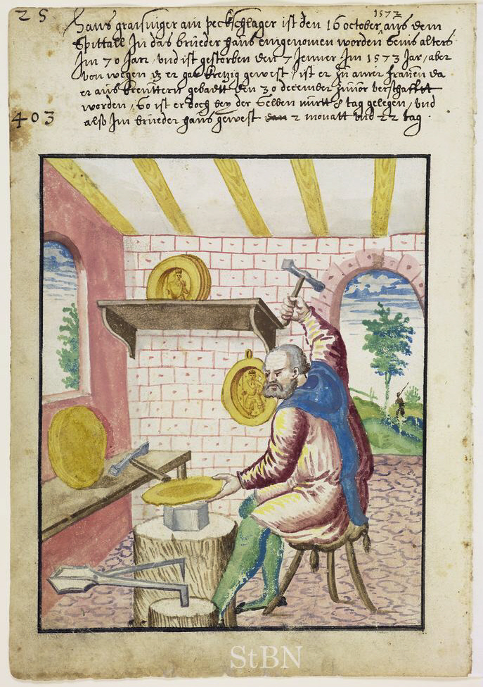 Hans graisinger (Graisinger; Greisinger), pecksch (Beckenschläger) Transkription und weitere Informationen